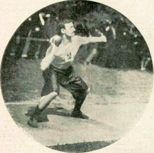 Émile Torchebœuf, champion de France de lancer de poids en 1900.